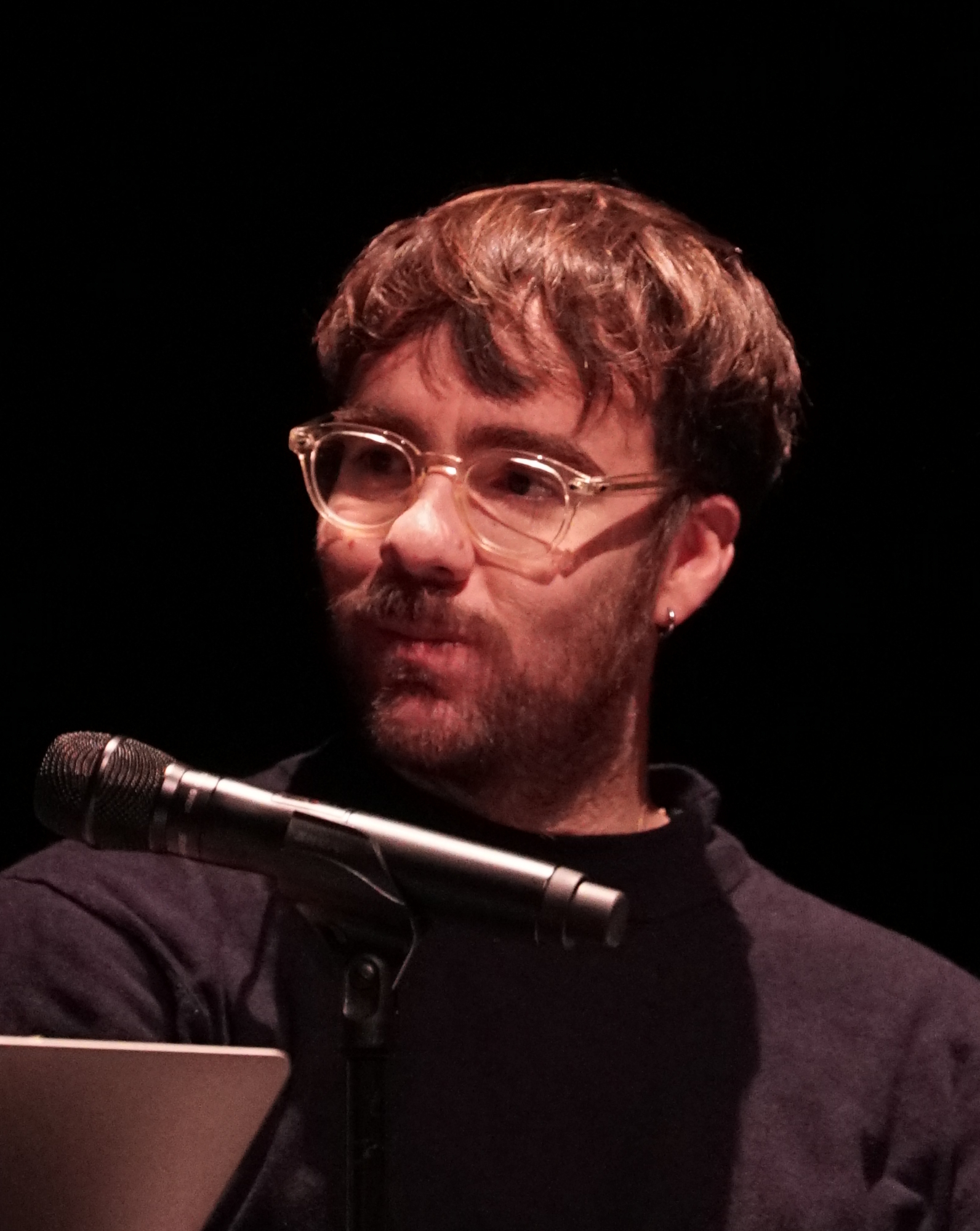 lors du festival Reims scènes d’Europe en 2019.